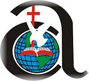 LOGO MARCA DA IGREJA APOSTÓLICA NO BRASIL